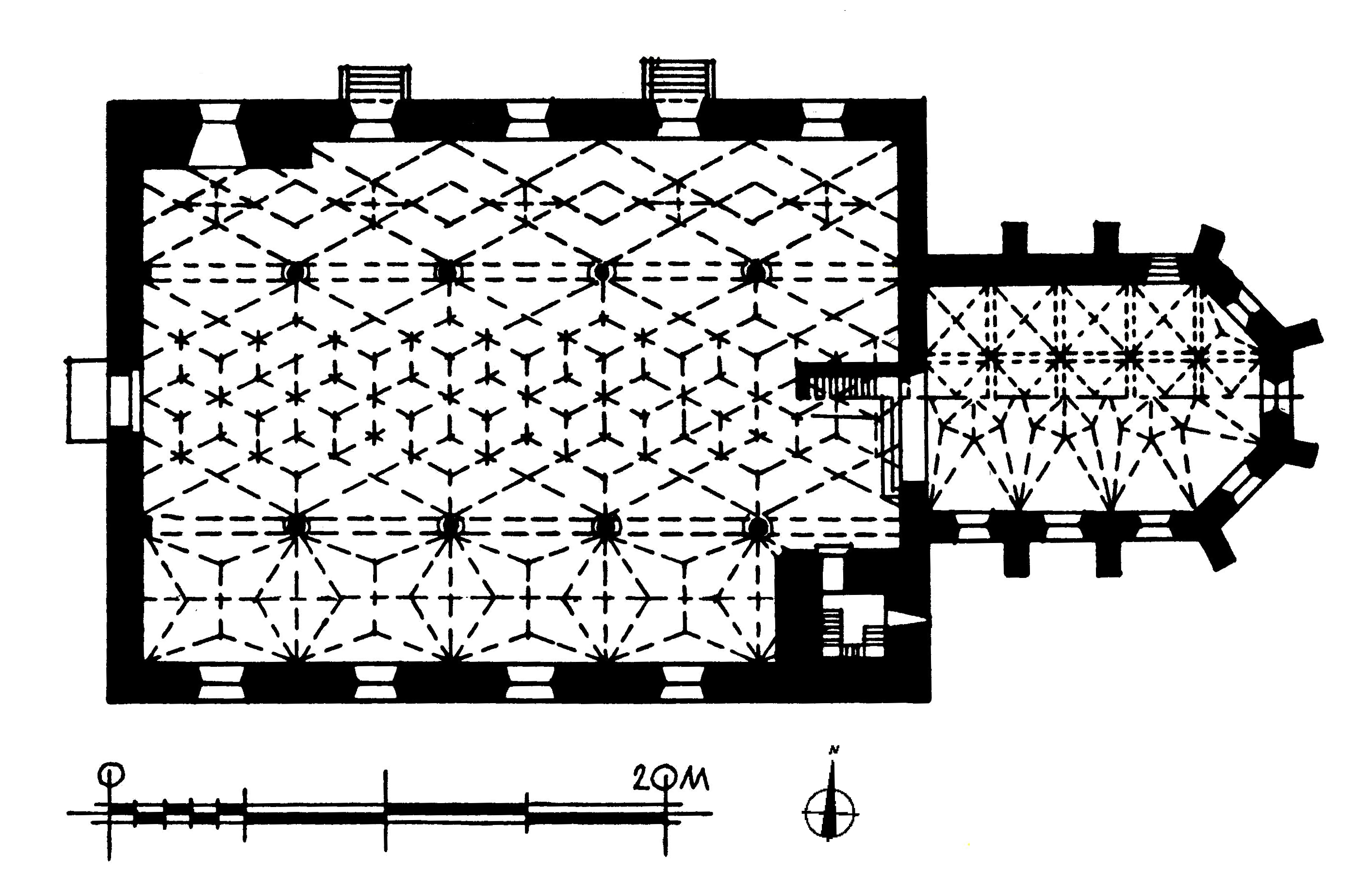 Grundriss der Pfarrkirche St. Philipp und Jakob im schwäbischen Bad Grönenbach